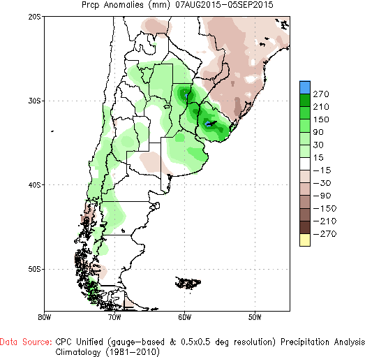 NOAA - Precipitaciones anormales Agosto 2015, Argentina